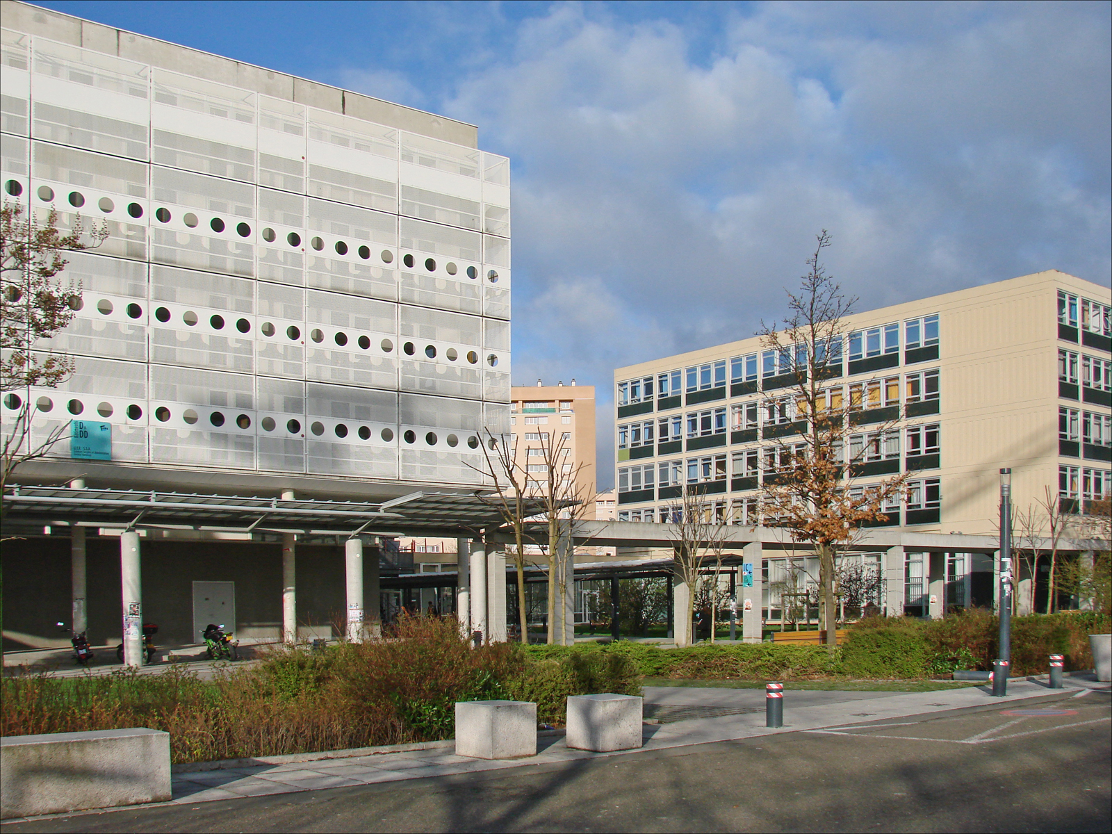 L'université Paris Ouest Nanterre La Défense